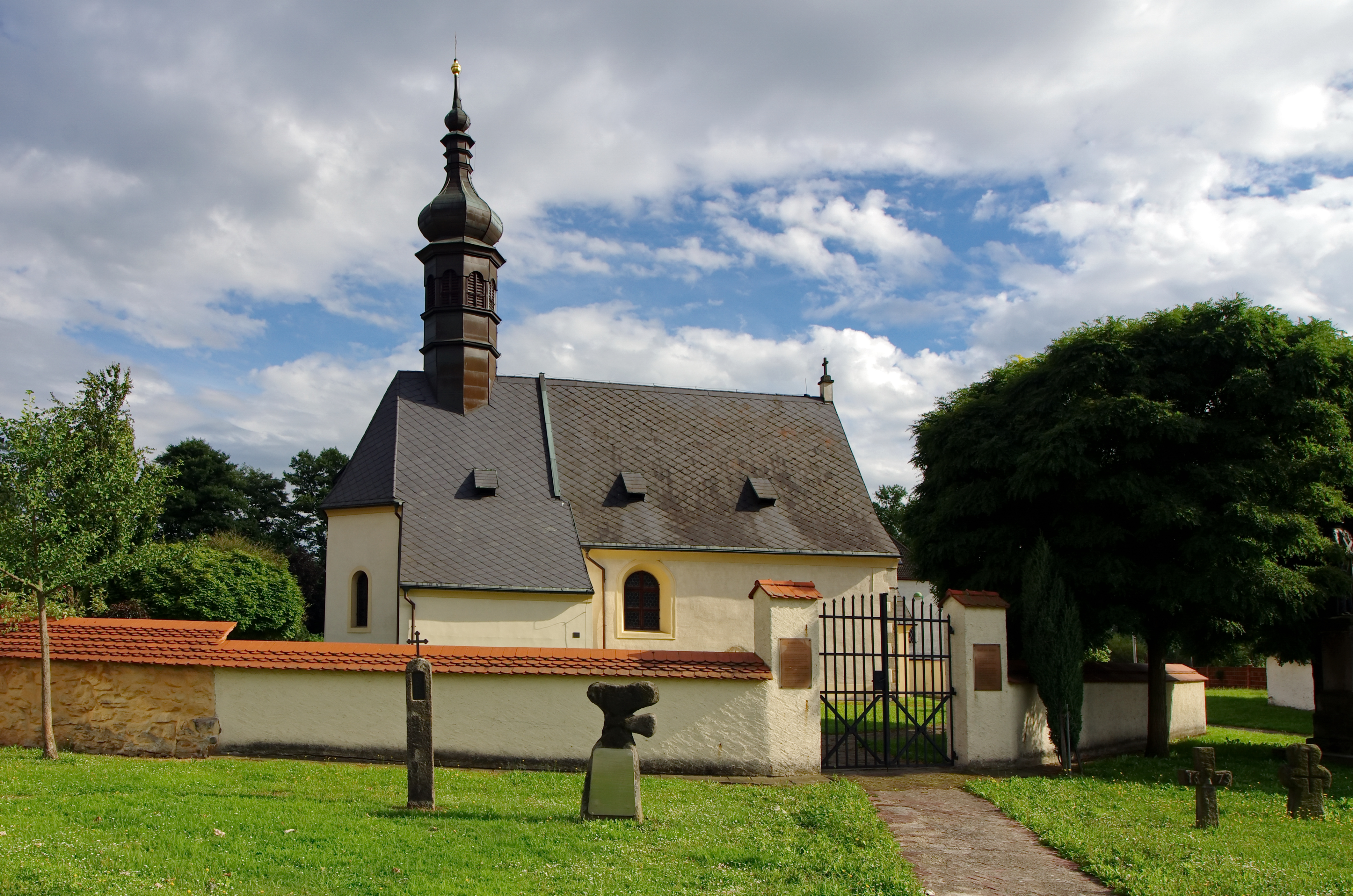 Kostel svaté Kunhuty, náves, Královské Poříčí.